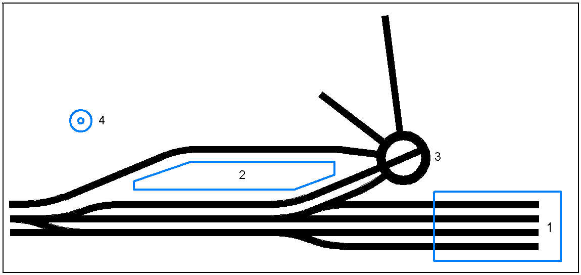 Grafik des Bahnbetriebswerk Dillenburg 2008